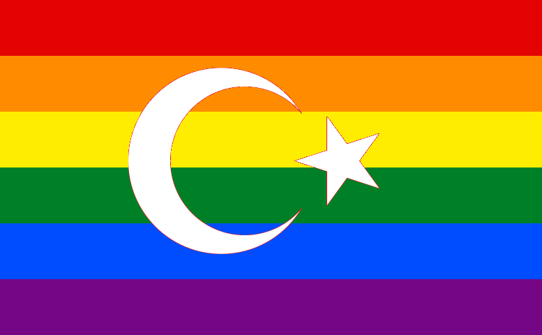 Bandera gay Turquía The Hijra diverse community consists of Six formal colouring source scheme, part of each Universal community representation: 1. Red - Gay/Life and Passion 2. Orange - Lesbianism/Recovery 3. Yellow - Bisexuality/Star and Moonlight - Crescent and Sunlight 4. Green - Transgenderism/Nature 5. Blue - Mentality and Physique/Art 6. Purple - Humanity and Harmony/Spirit